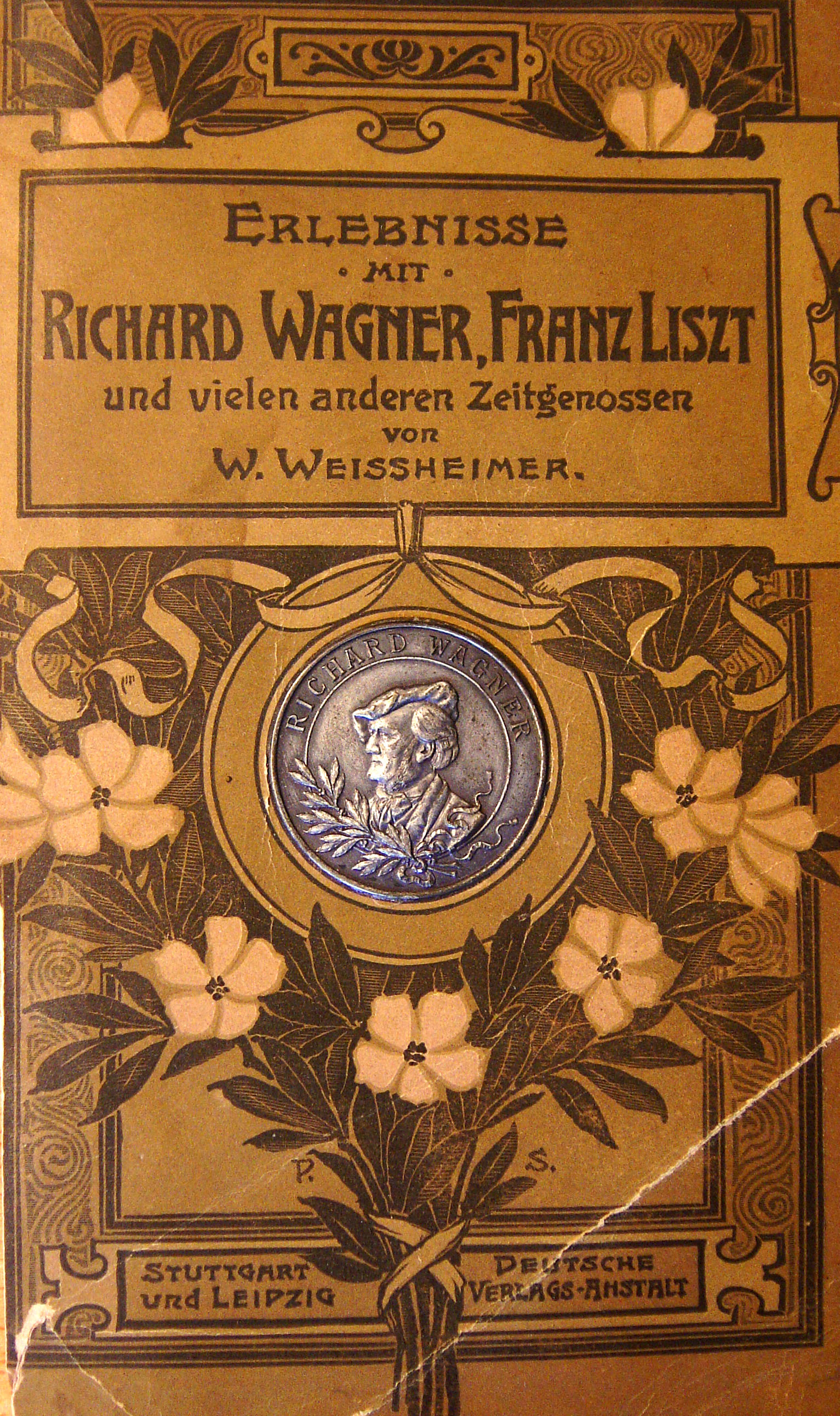 Wendelin Weißheimers Buch: Erlebnisse mit Richard Wagner, Franz Liszt und vielen anderen Zeitgenossen